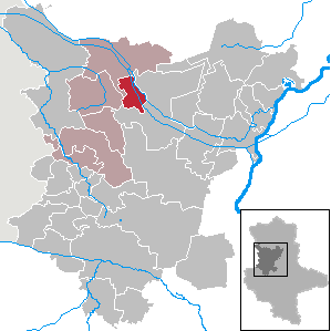 Bülstringen in Saxony-Anhalt (Country) - District (Landkreis) Börde